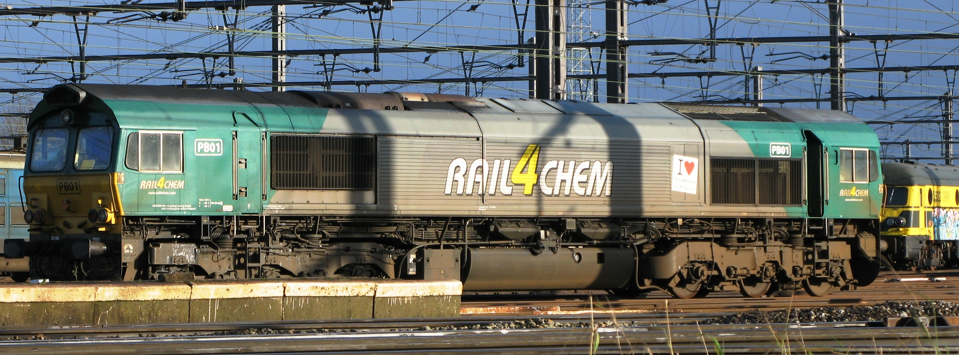 D' Lokomotiv PB01 vun der Rail4Chem aus der EMD Serie 66 an der Rangéiergare zu Montzen (B). D'Numeréierung PB01 kënnt vun der Leasingsfirma Porterbrook Leasing déi dës Lokomotiv als éischt un d'ShortLines an Holland geleast hat. Kategorie:Lokomotiven